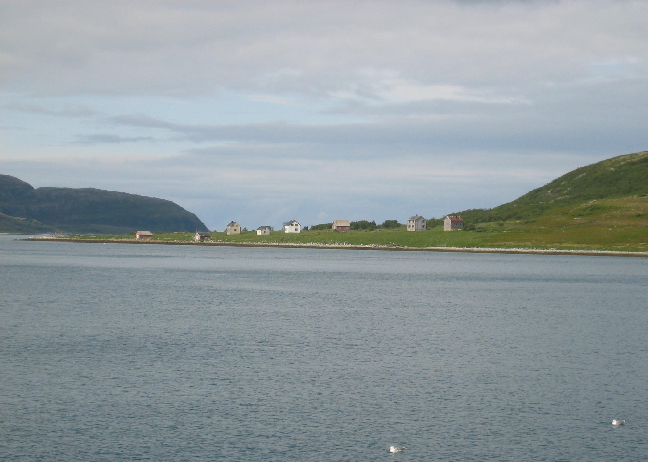 Fra Burøysund